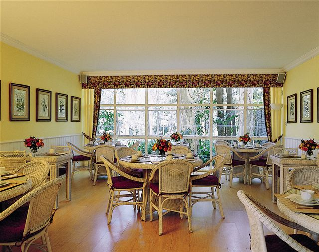 Salão de chá da Fundação Maria Luisa e Oscar Americano São Paulo Brasil